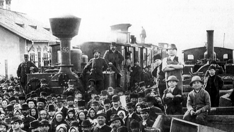 A székelygőzös megérkezése Udvarhelyre 1888. március 15-én. A vonatra felállva Ugron Gábor.